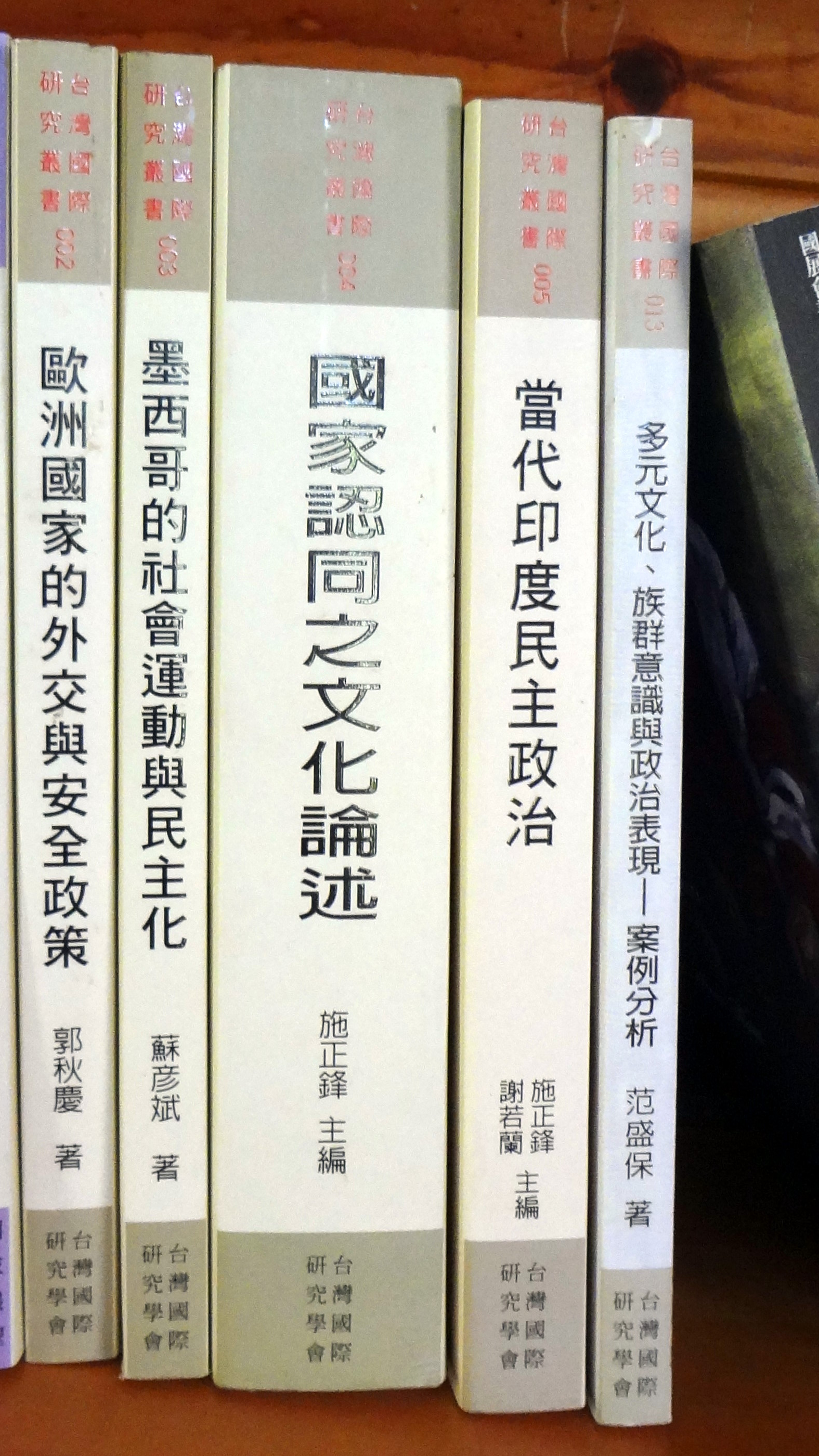 苗栗縣南庄鄉瓦祿產業文化館書架展示的台灣國際研究學會《台灣國際研究叢書》五本書。